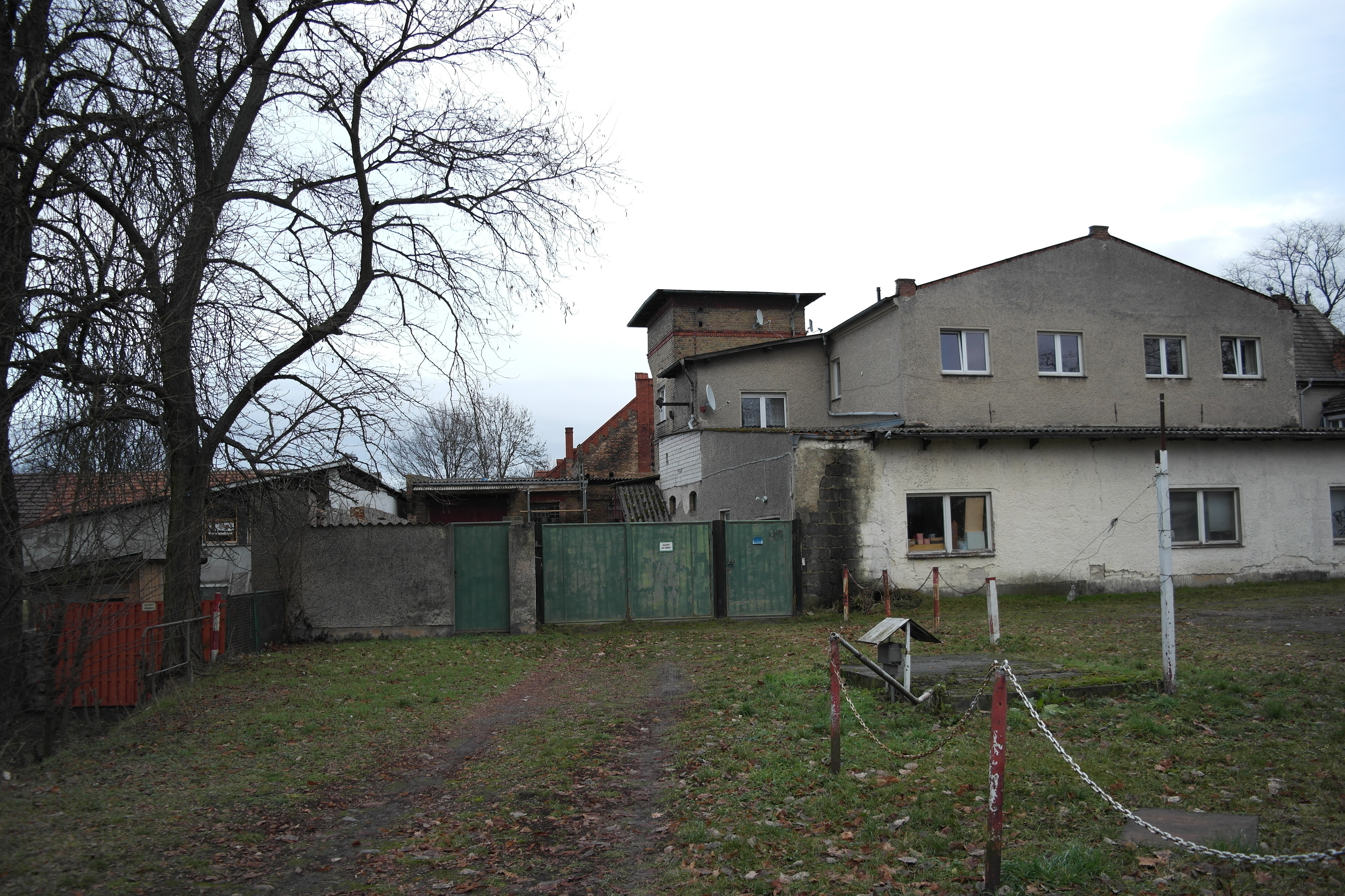 Brennerei des Gutes Dahlewitz. Hier endete die Gutsbahn.